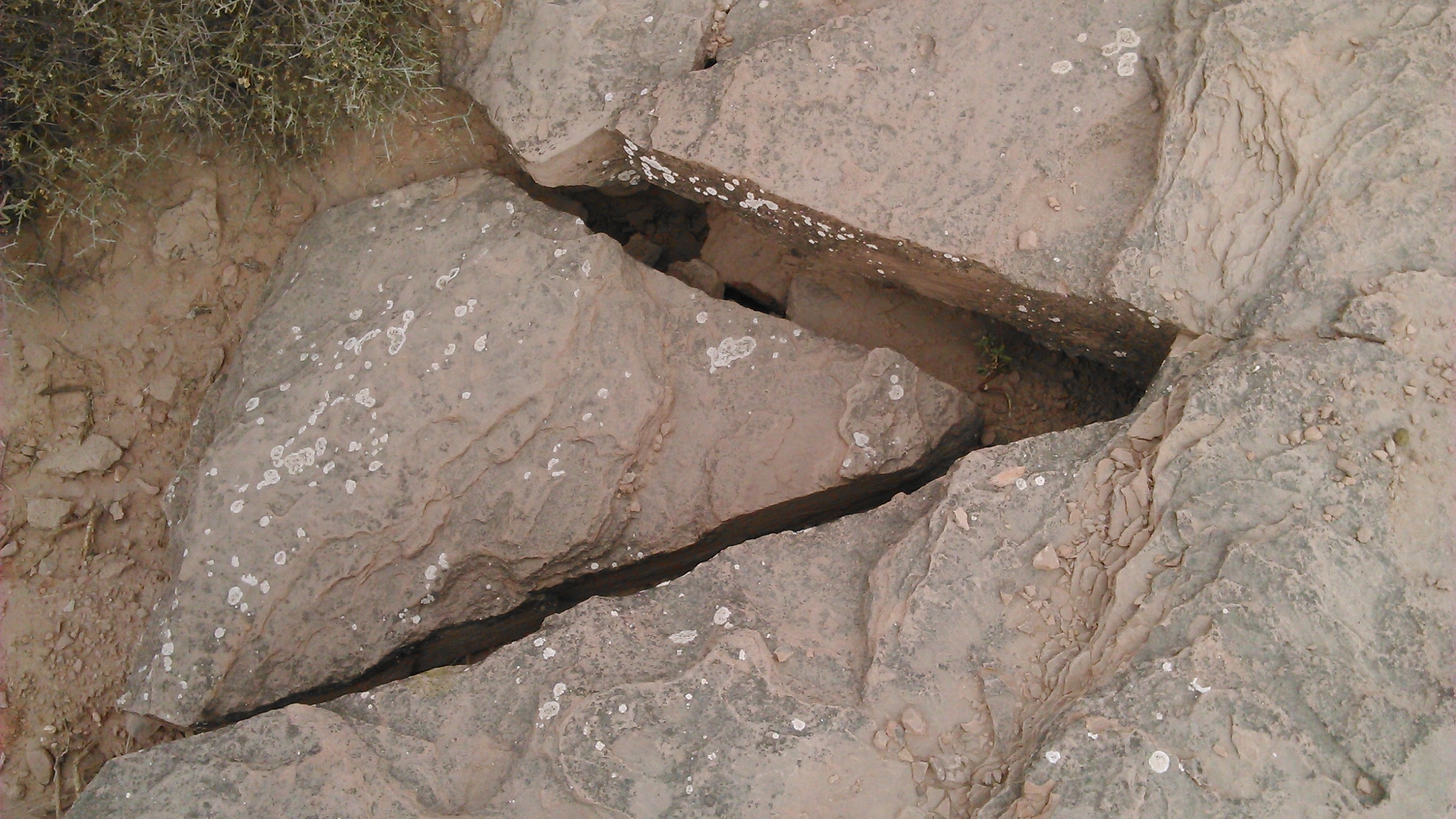 Es un segmento de alguna roca ubicada en la barda sur de General Roca, en el Valle de la Luna rojo